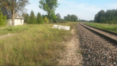 Pūres pieturas punkta vieta.